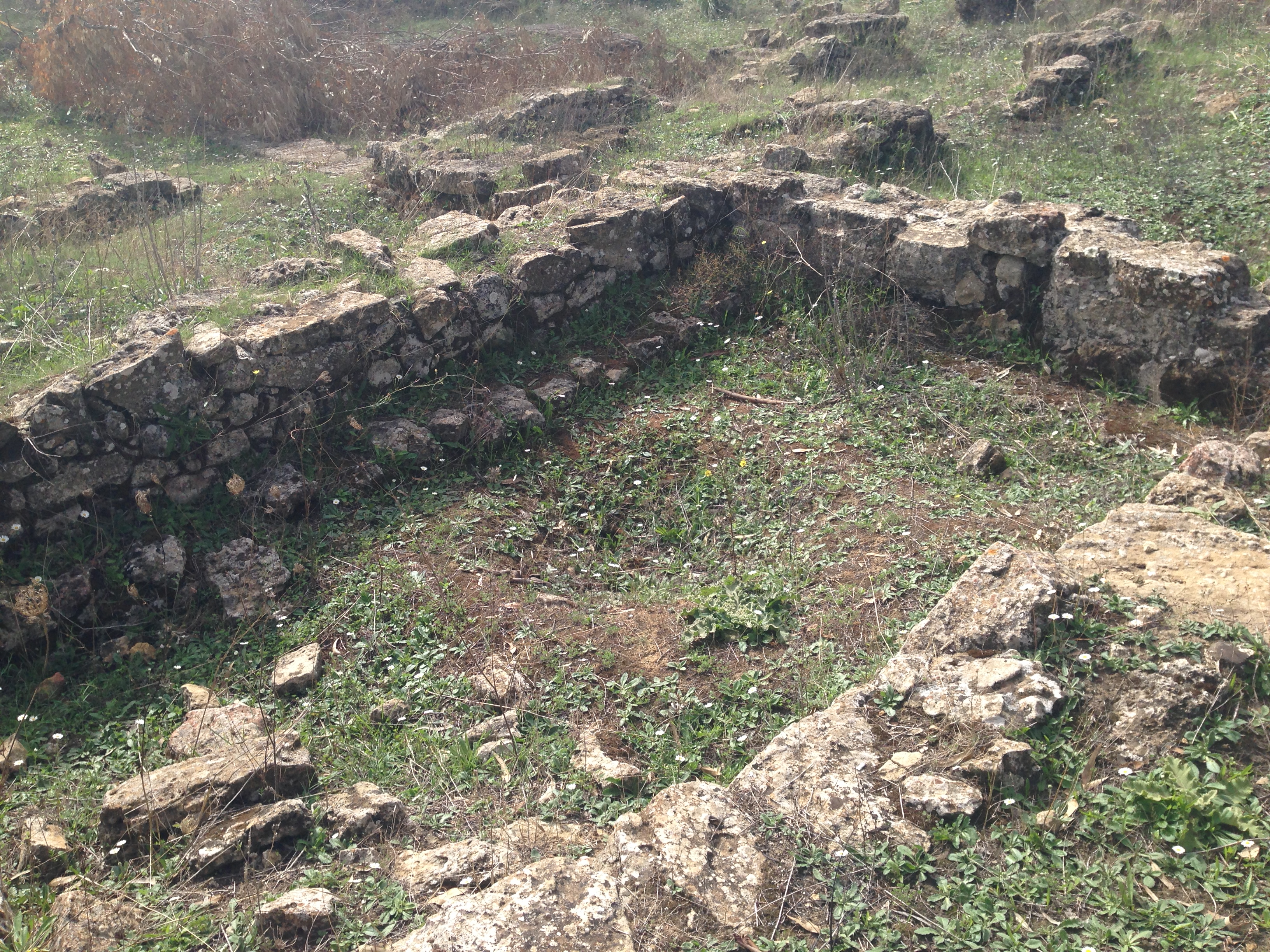 Resti dell'antica città